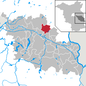 Madlitz-Wilmersdorf in Brandenburg (Country) - District Oder-Spree